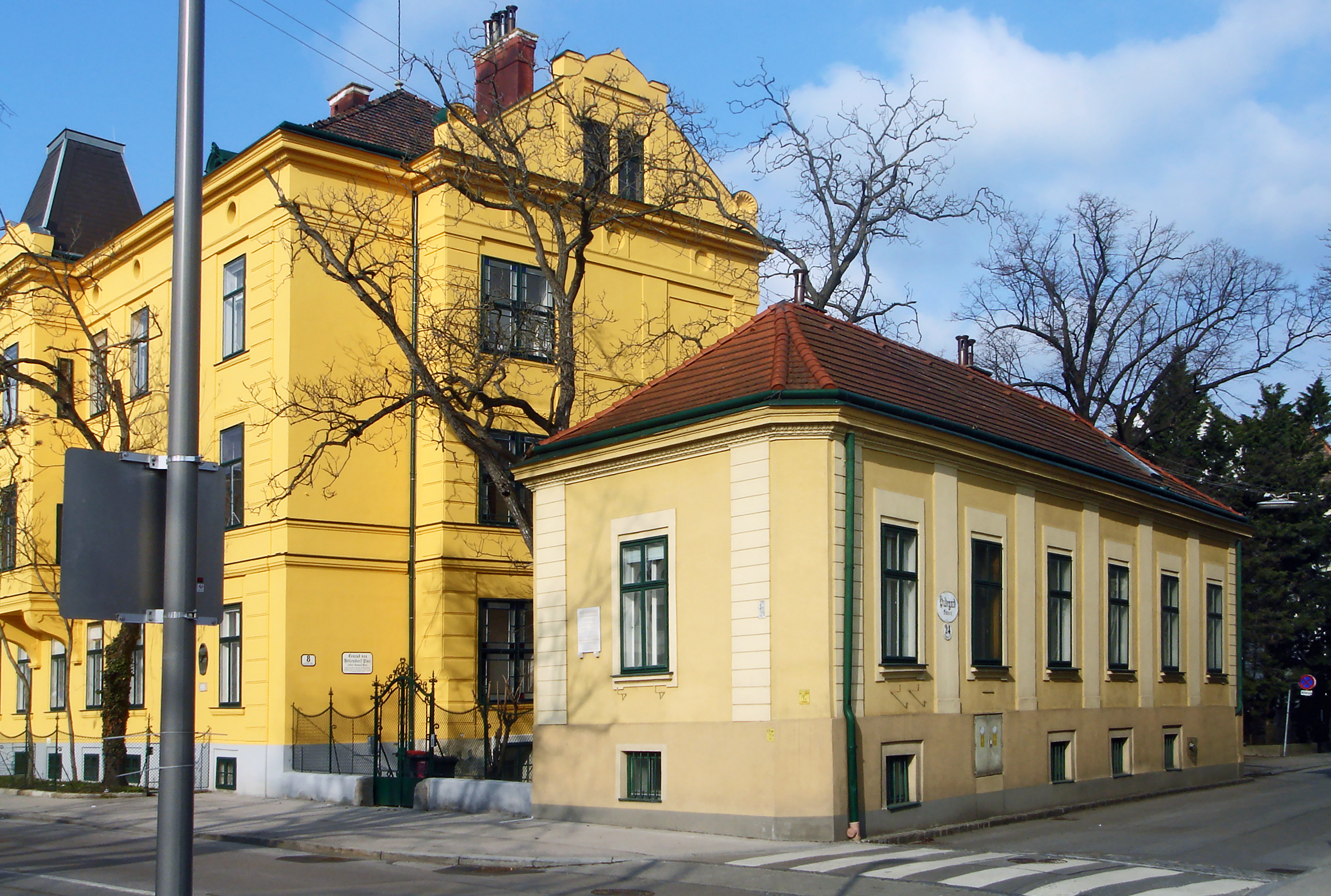 Carl Michael Ziehrer, Baden bei Wien, (zeitweise vor dem Ersten Weltkrieg genutztes) Wohnhaus, Conrad-von-Hötzendorf-Platz 8 (Identadresse: Hildegardgasse 24)